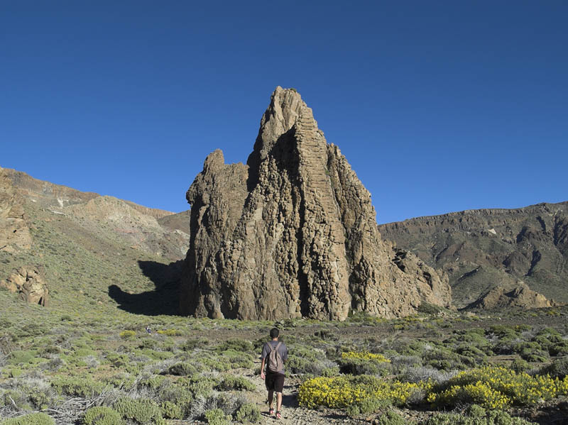 Tremendo pedrusco que hay al final del sendero de los Roques de García, es fácil imaginar de donde le viene el nombre, en primer plano Sandro "el peregrino" ;P